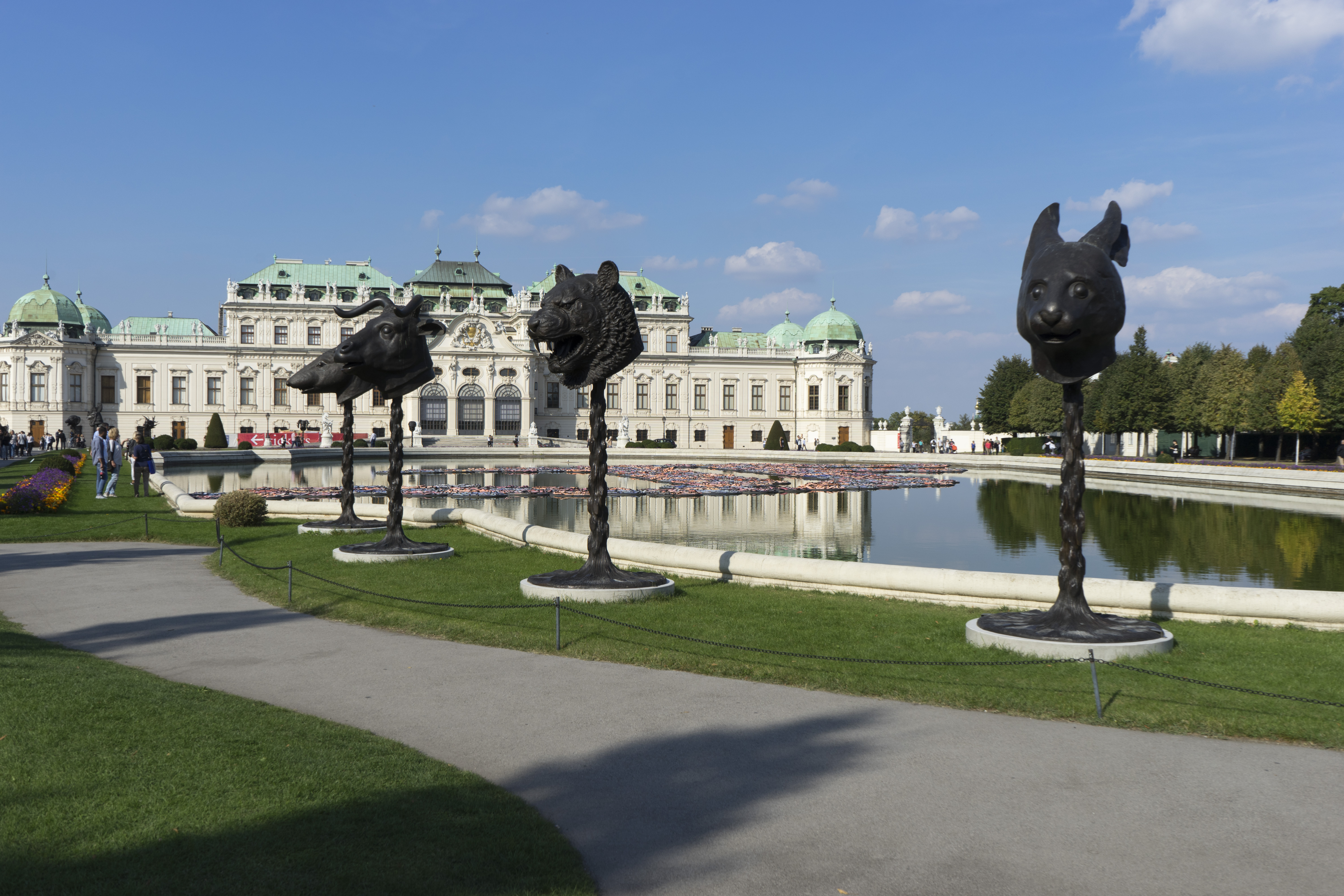 Ai Weiwei translocation – transformation exhibition belvedere. Swim wests and chinese signs of zodiac